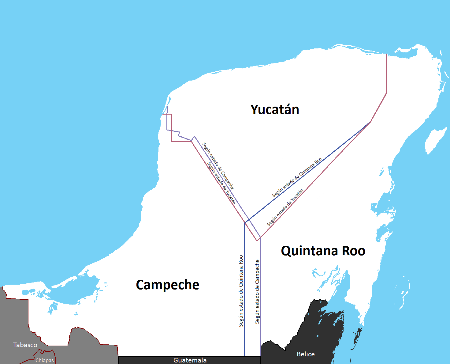 Conflicto Limitrofe entre Yucatan, Campeche y Quintana Roo